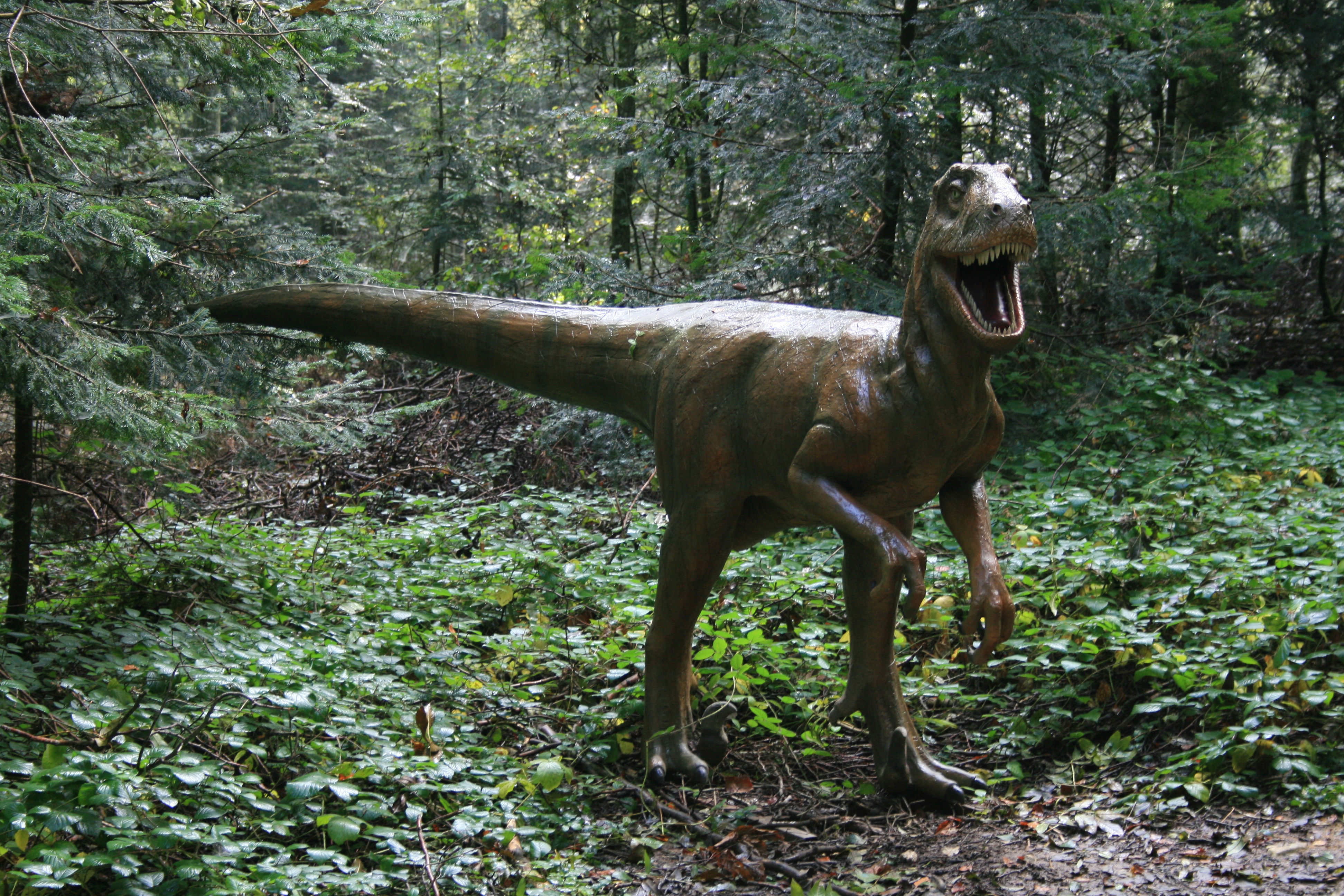 Deinonychus, Préhisto-parc de Réclère